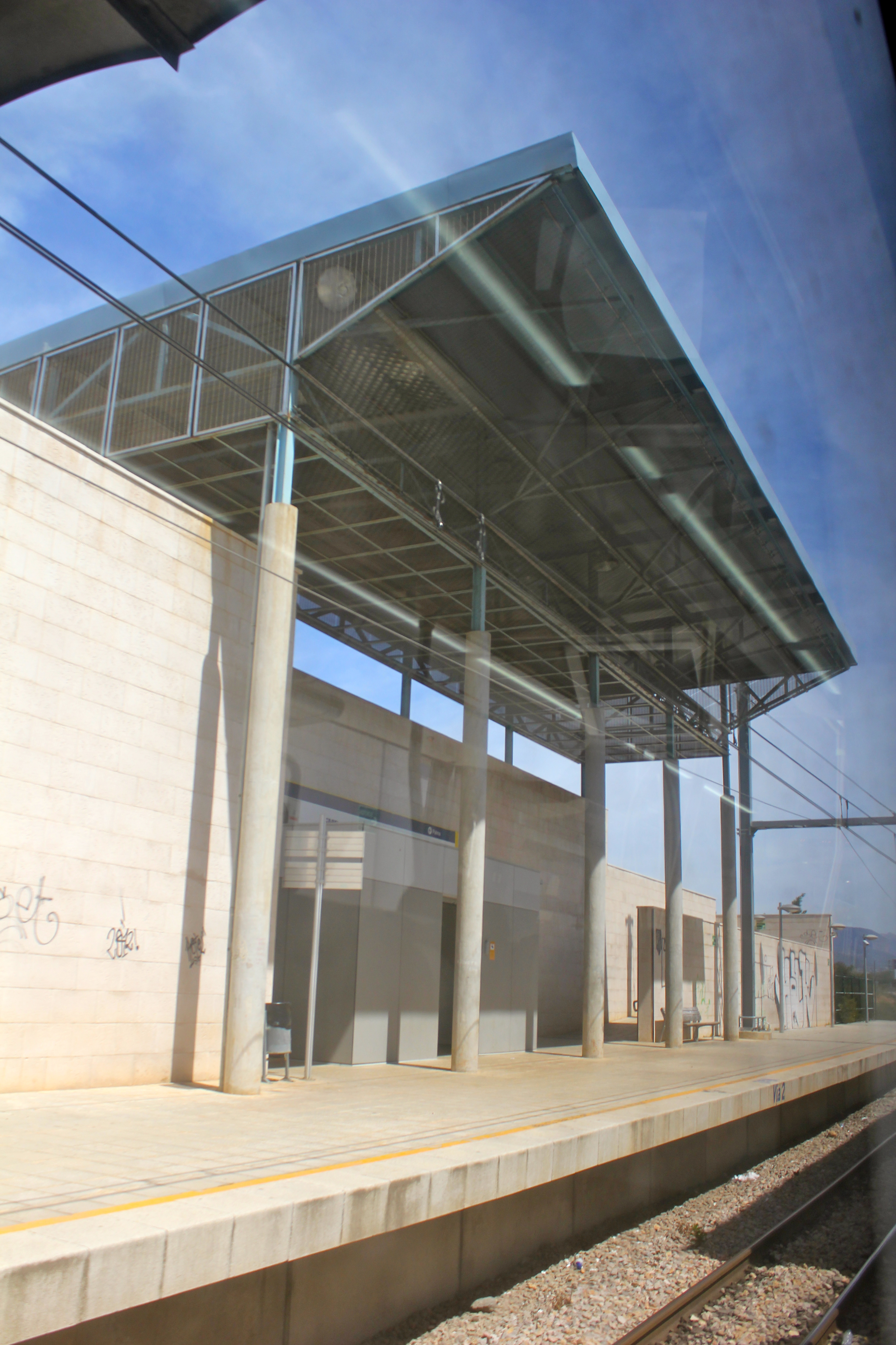 Estació de Es Caülls